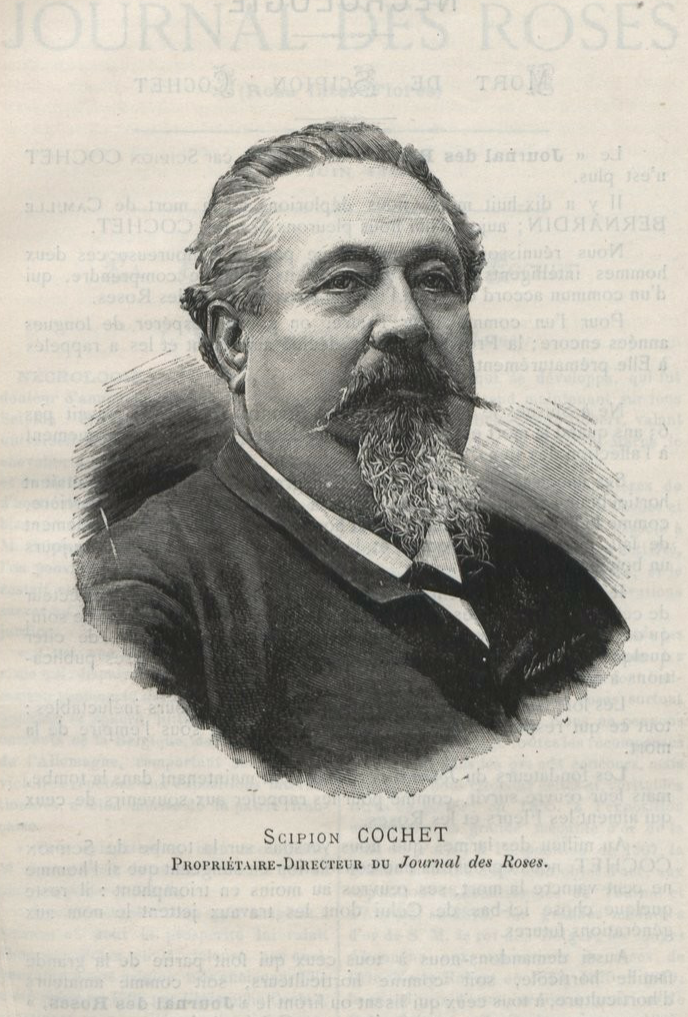 Scipion Cochet (1833-1896), gravure dans le Journal des roses, juin 1896. Horticulteur français et rosiériste, maire de Grisy-Suisnes.